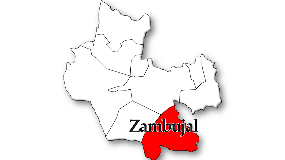 População